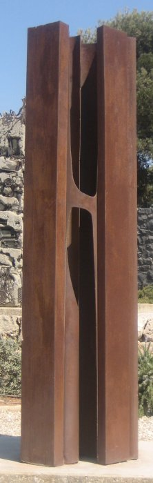 Sculpture